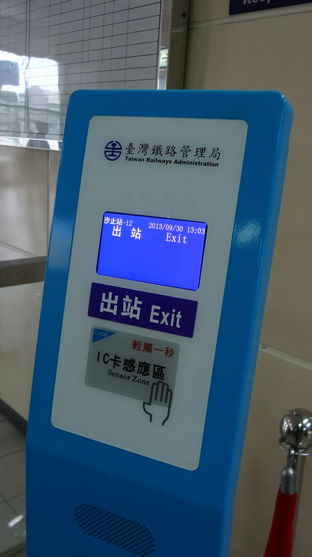 臺灣鐵路管理局汐止車站出站IC卡讀卡機